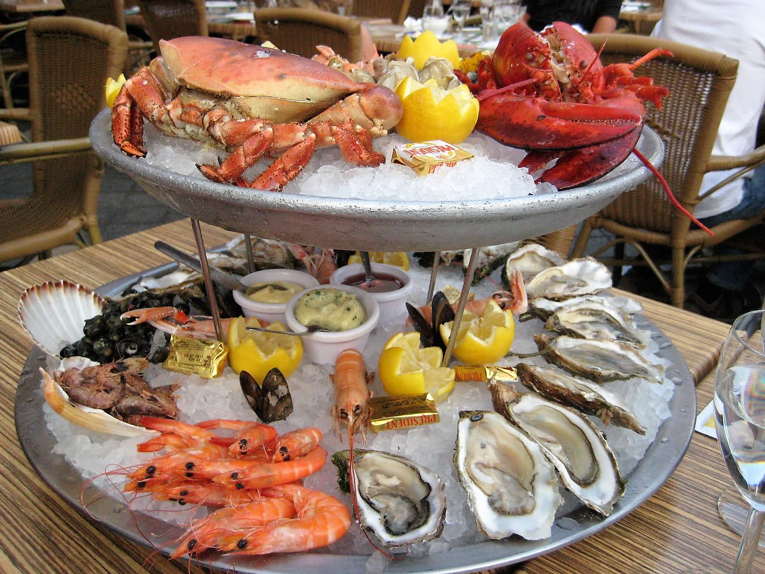 Etagere mit verzehrfertigen Früchten des Meeres (fruits-de-mer), in einem Restaurant in Tours, Frankreich.